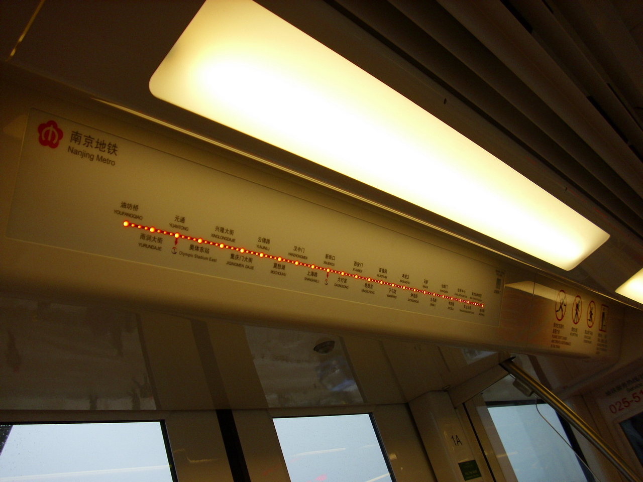 南京地铁2号线 列车内部的电子线路图